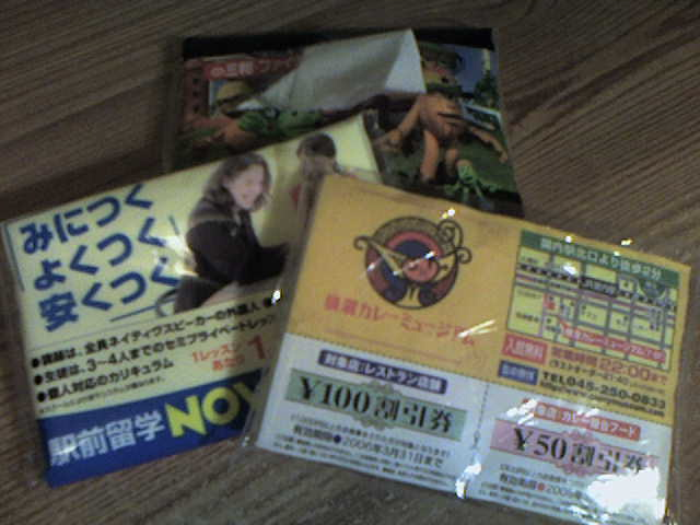 Photo de mouchoirs japonais avec publicités pour illustrer l'article "mouchoir" de wikipédia.